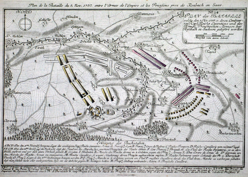 In der Schlacht bei Roßbach in der Nähe von Reichardtswerben im Kurfürstentum Sachsen ( heute Sachsen-Anhalt ) am 5. November 1757 besiegte der preußische König Friedrich der Große die Franzosen unter dem Prinzen von Soubise (1715-1787) und die mit ihnen koalierende Reichsexekutionsarmee unter dem Kommando des Reichsgeneralfeldmarschalls Prinz von Sachsen-Hildburghausen.